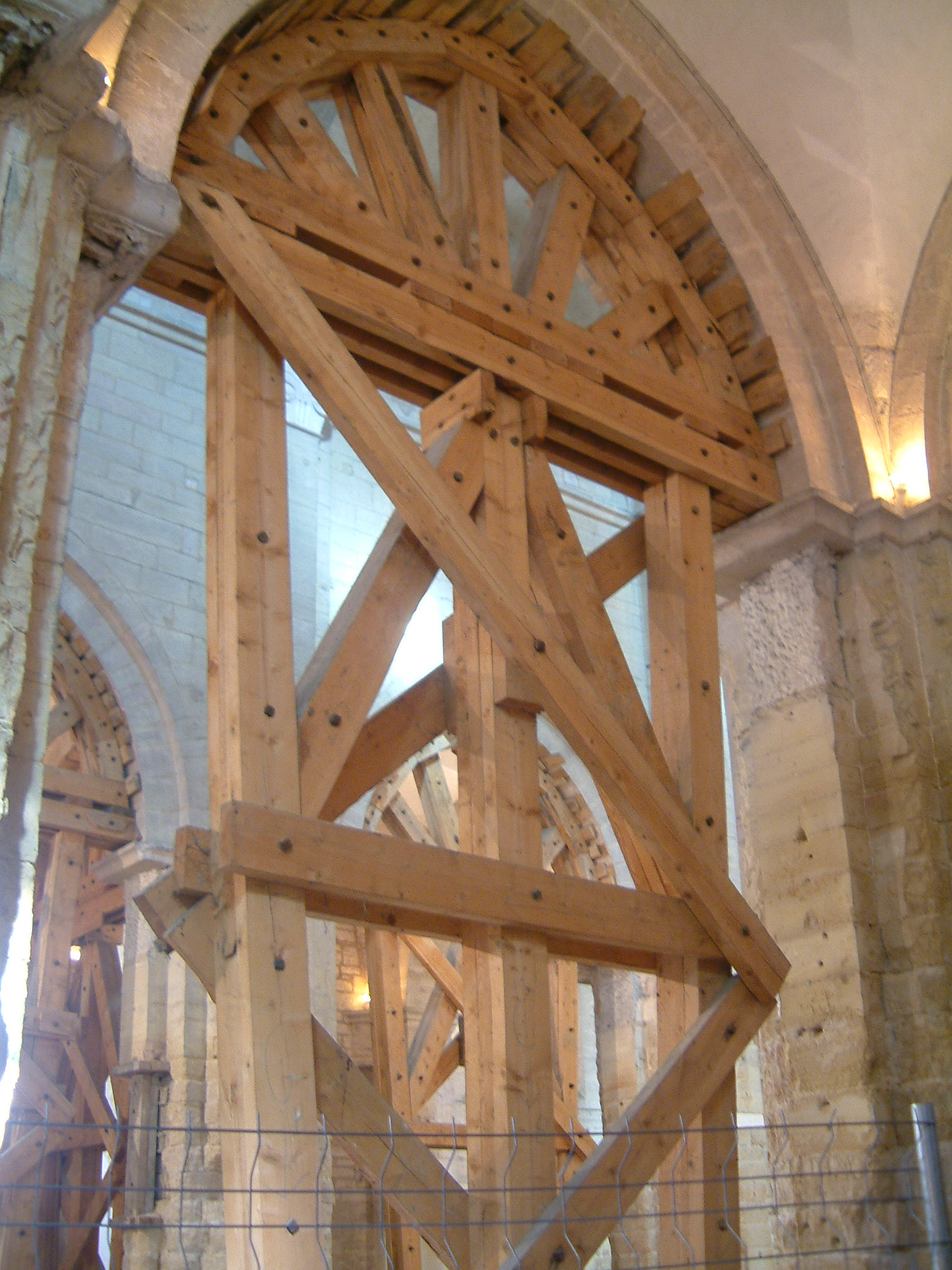 Église Saint-Philibert, Dijon, Bourgogne, FRANCE.